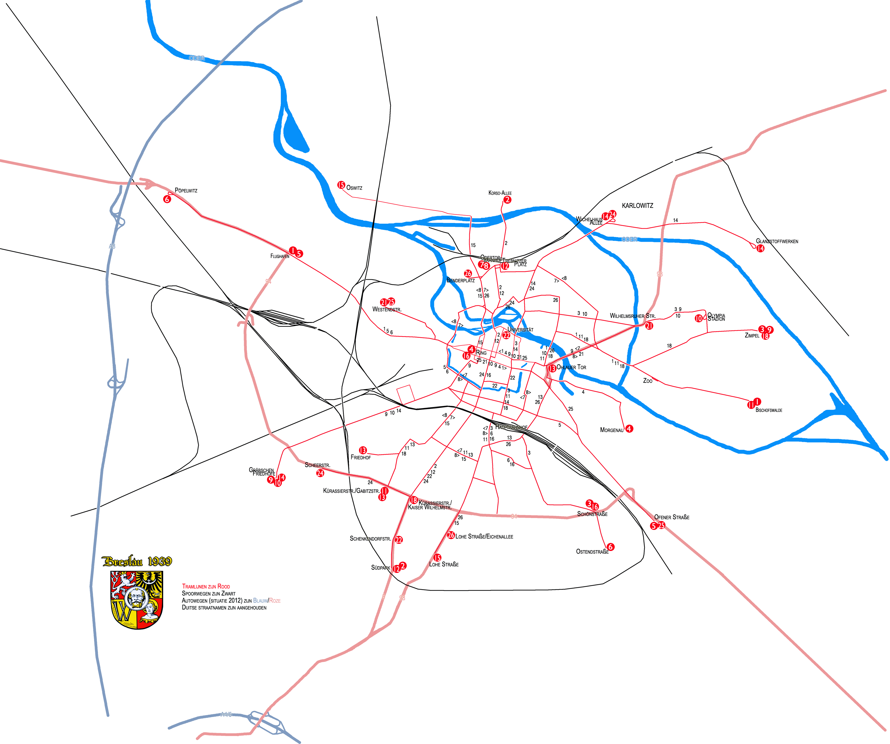 Tramnet Breslau/Wroclaw 1939